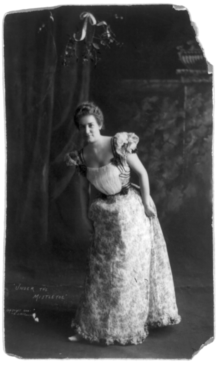 Woman standing under mistletoe. Viscum album